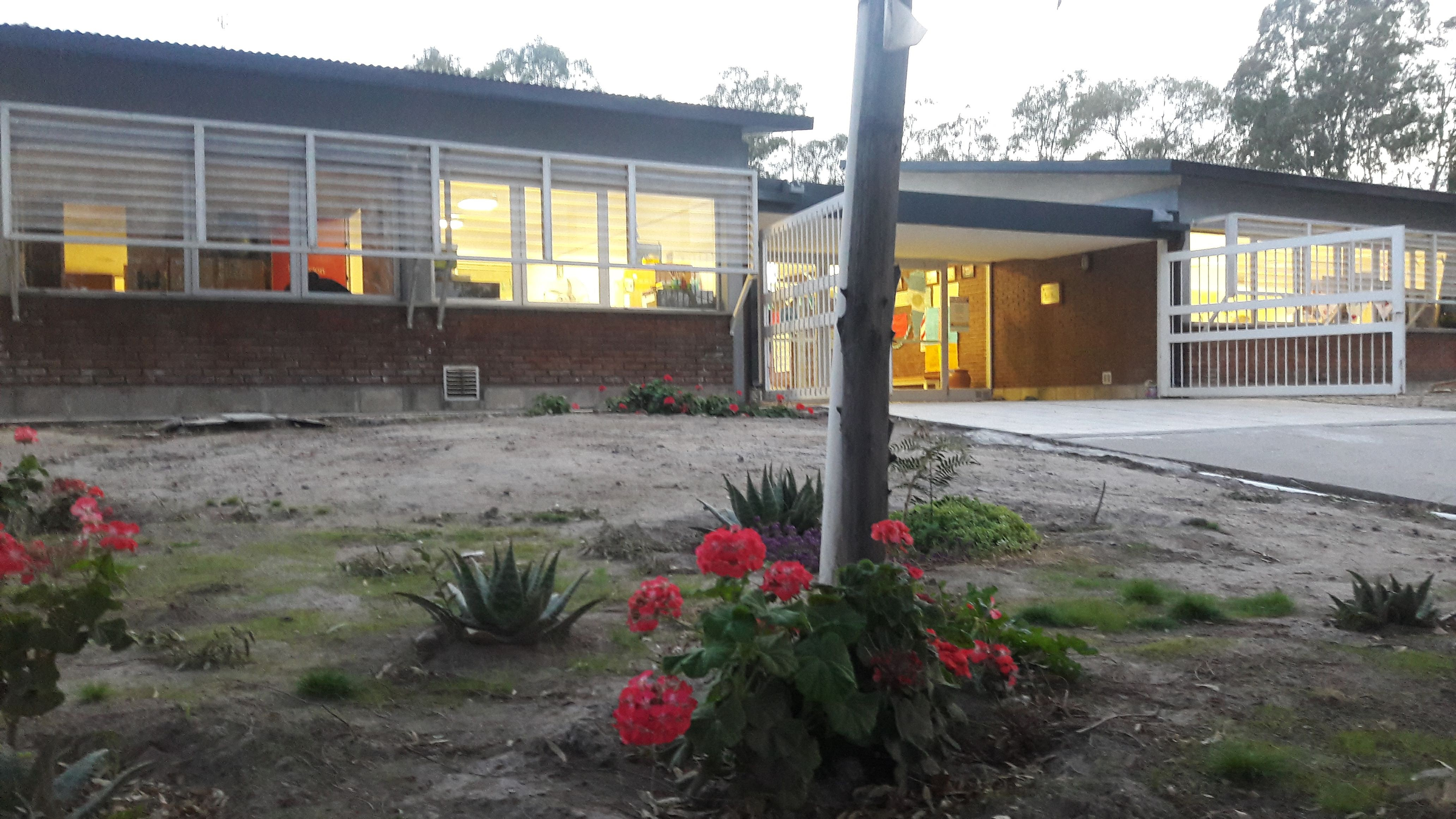 El Colegio Secundario La Adela es la única oferta educativa de nivel medio de la localidad homónima.